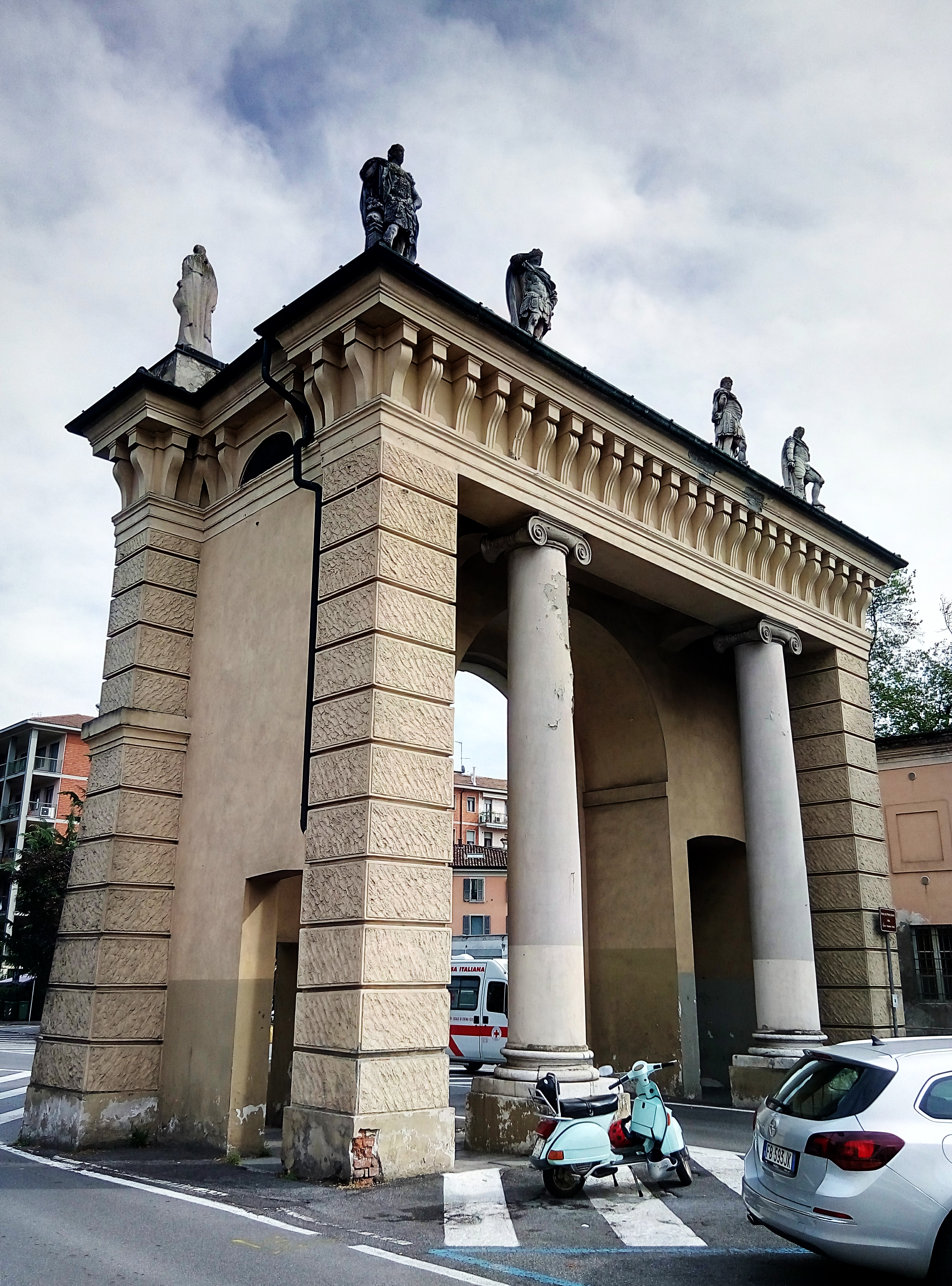 Porta Serio e altre italianeità This is a photo of a monument which is part of cultural heritage of Italy.